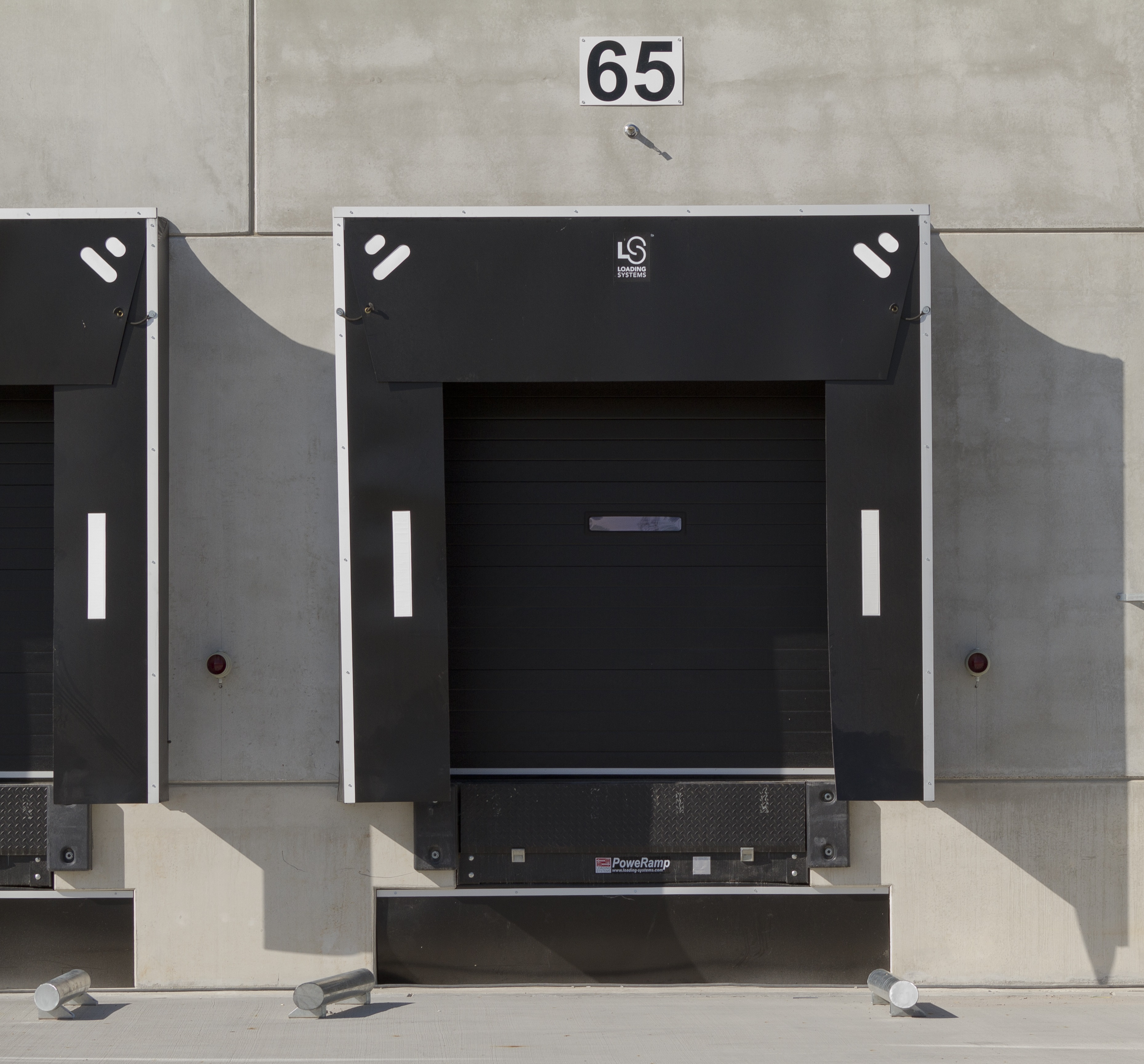 Op deze foto is een compleet laad- en losdock afgebeeld zoals deze vaak word gebruikt. Een overhead deur, dock shelter en laadbrug zijn geïnstalleerd.